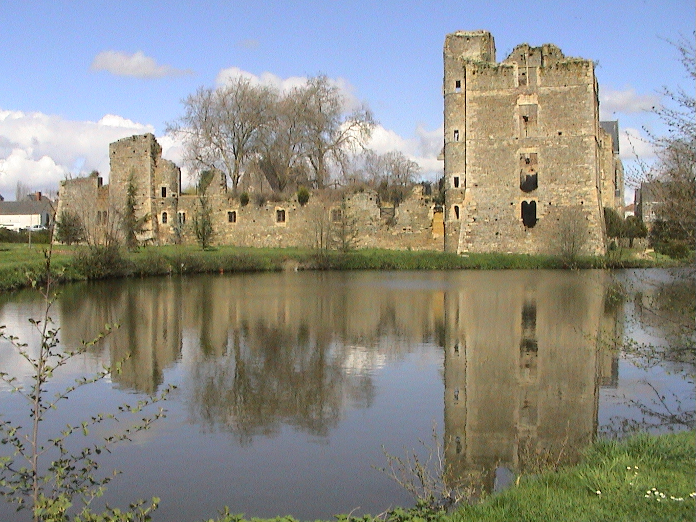 Valanjou : château de Gonnord façade sud-ouest.